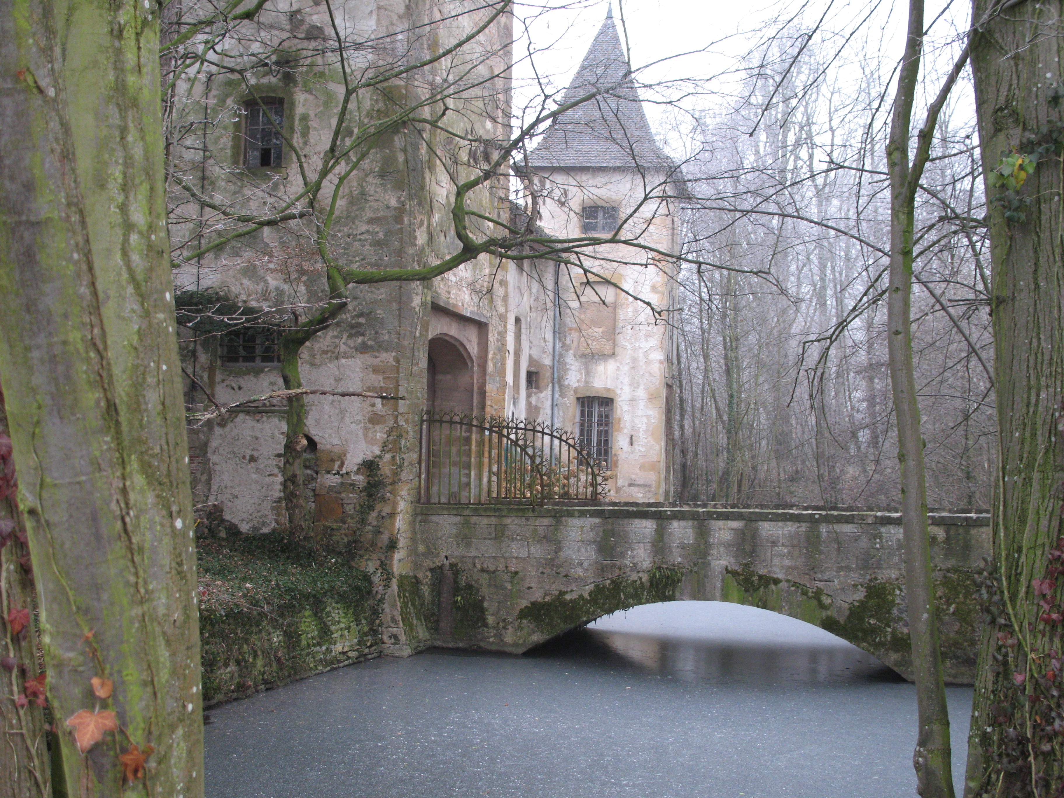 château d'Estours - Crèches-sur-Saône (Saône-et-Loire)